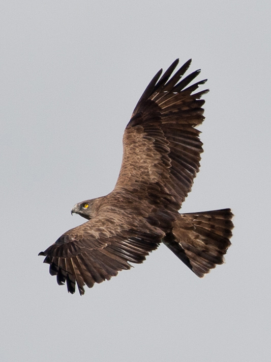 Aguila Culebrera Circaetus gallicus en vuelo, despues de cruzar el Estrecho. Punta Carnero, Andalusia, Spain.